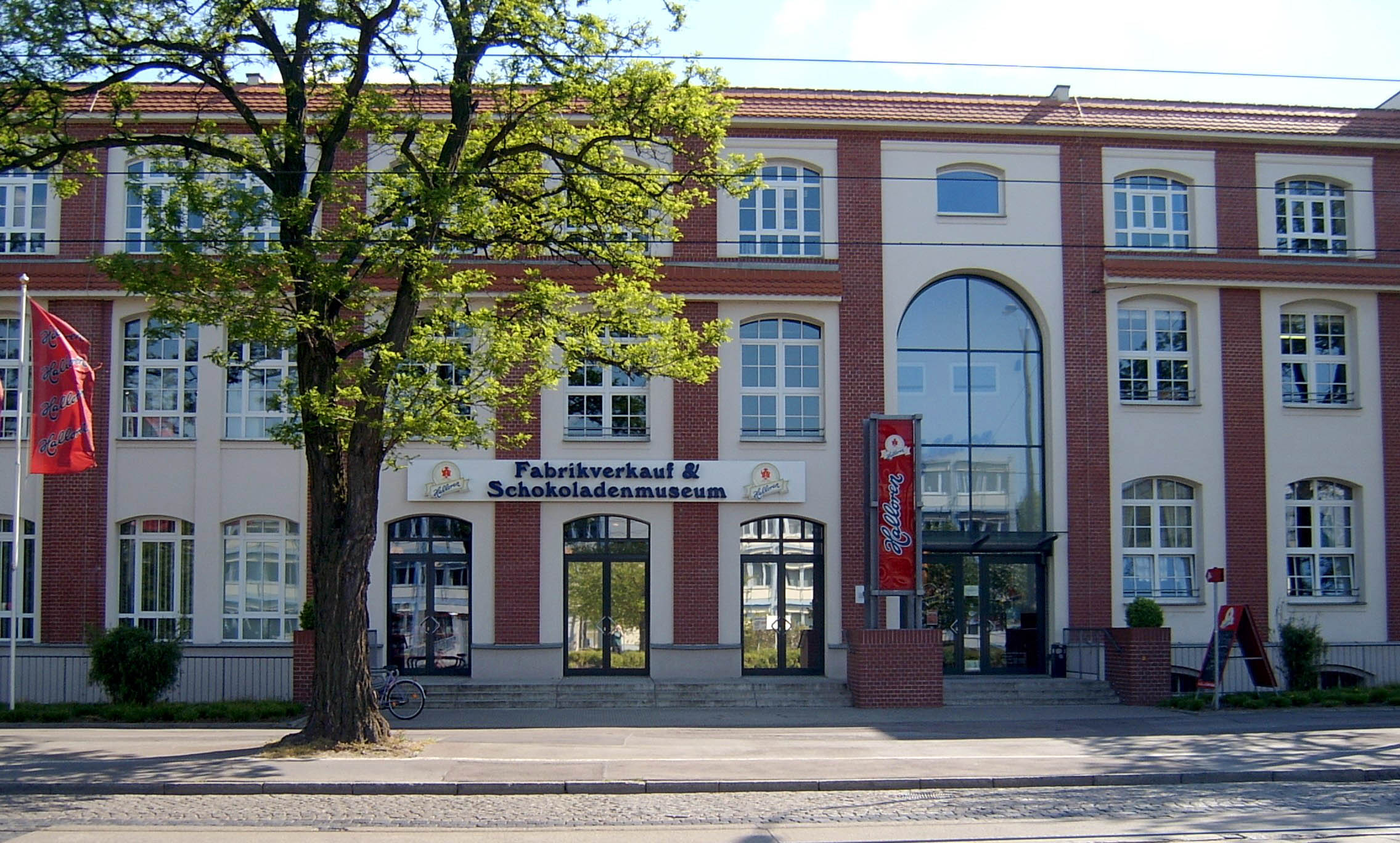 Das Gebäude der Halloren Schokoladenfabrik in Halle (Saale) - Eingang zum Fabrikverkauf und Schokoladenmuseum - OpenStreetMap(Info)